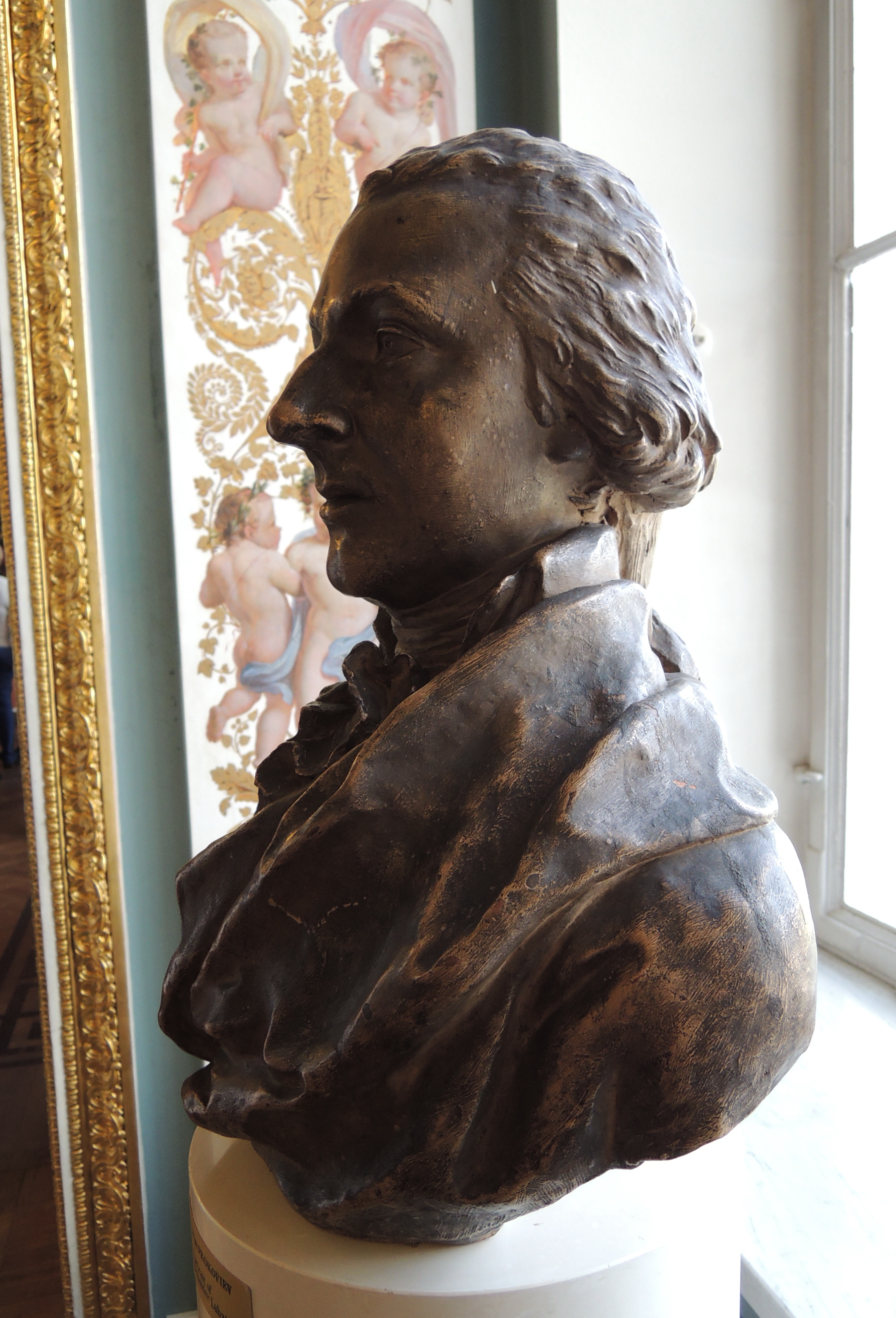 И. Прокофьев. «Портрет А.Ф. Лабзина», 1802, ГРМ